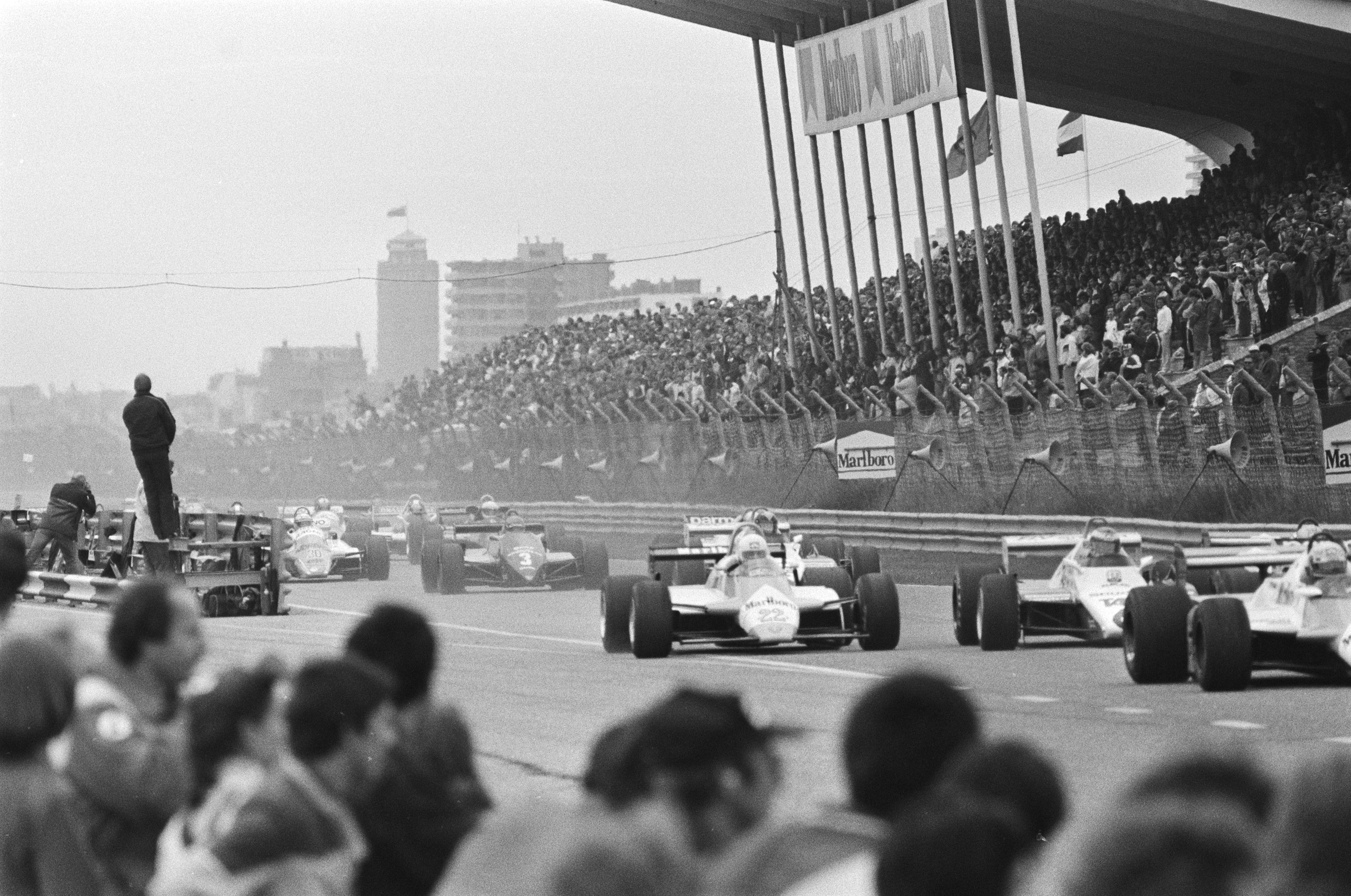 Grand Prix van Nederland te Zandvoort; overzicht bij start.